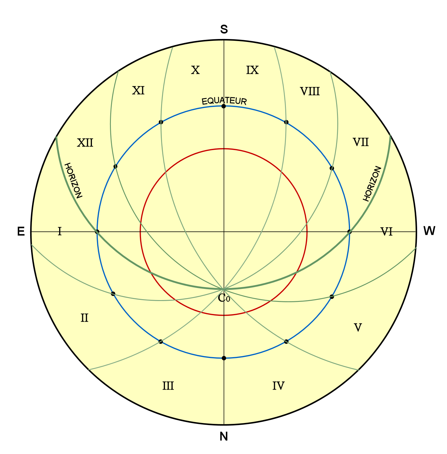 Tympan spécial avec les maisons célestes astrologiques.